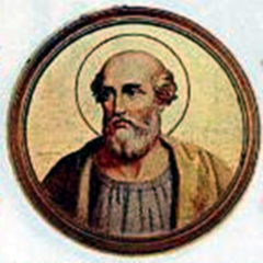 Papa Higino